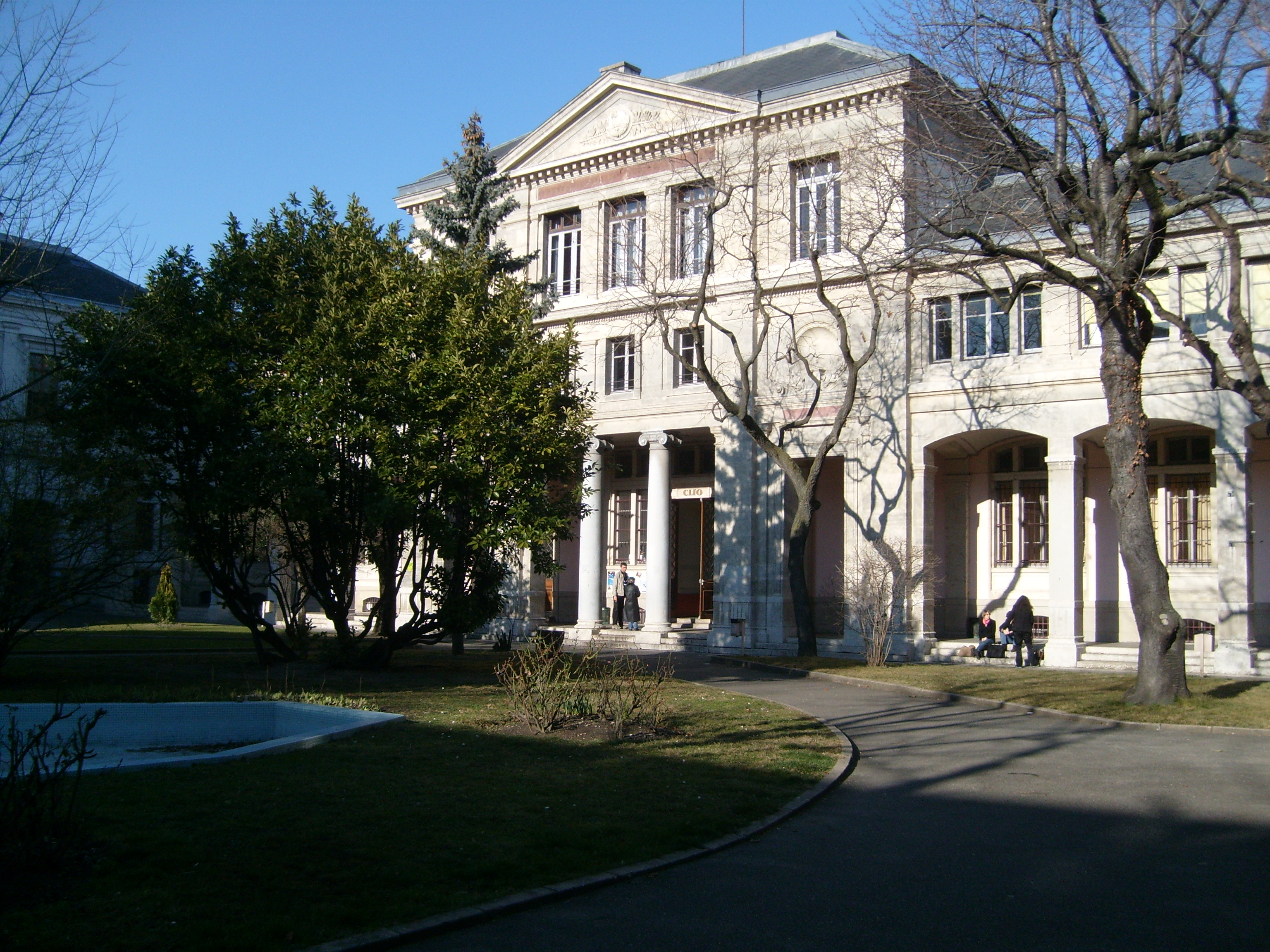 Façade du bâtiment Clio (faculté de droit et de science politique), sur le campus des Berges du Rhône, Université Lyon 2 - Lumière.